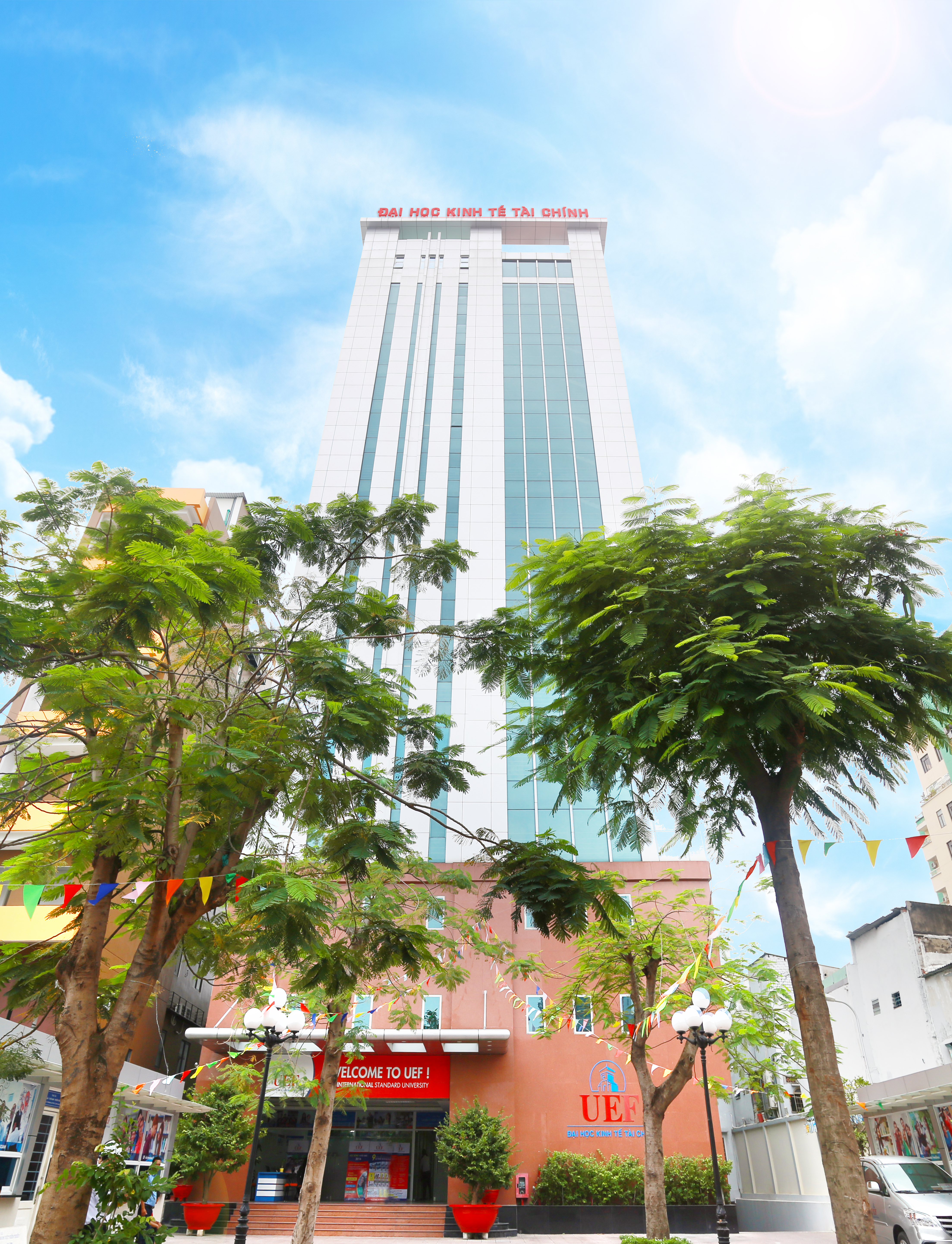 Photo de l'Université vue de devant